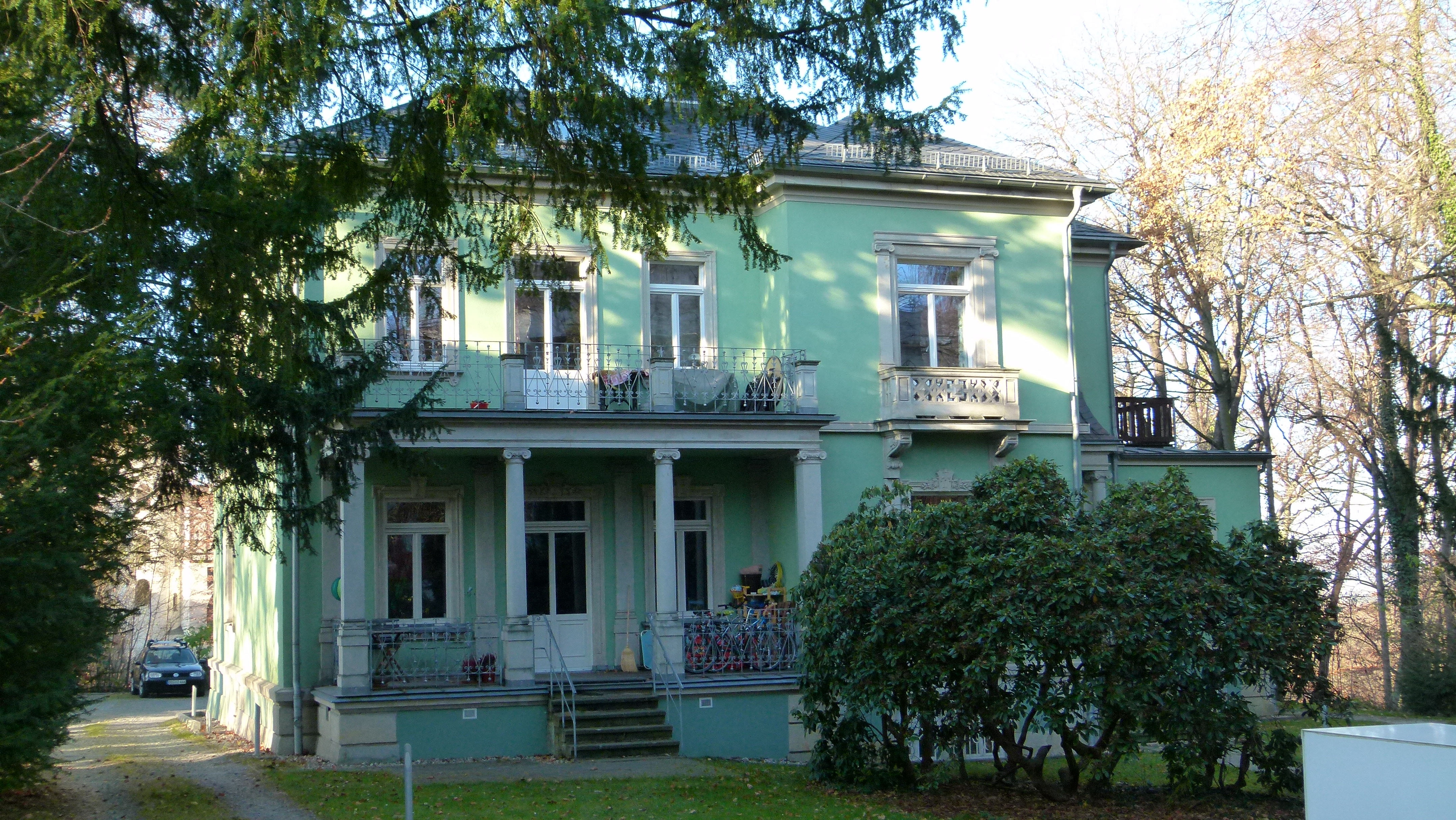 Küntzelmann Villa auf dem Weißen Hirsch, Lahmannring 1, Dresden